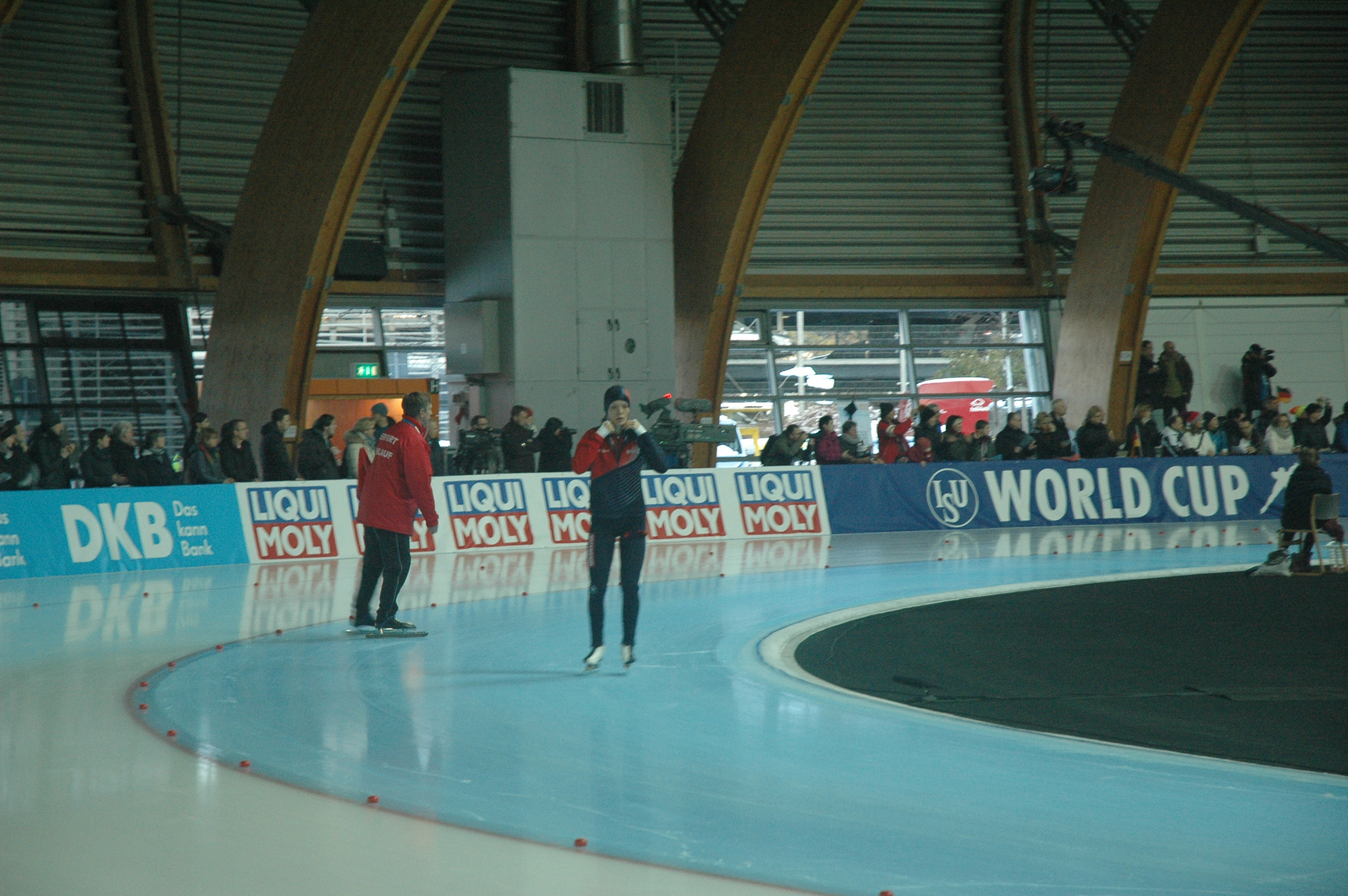 Zdráhálová tijdens wereldbekerwedstrijd Erfurt d.d. 21 januari 2018